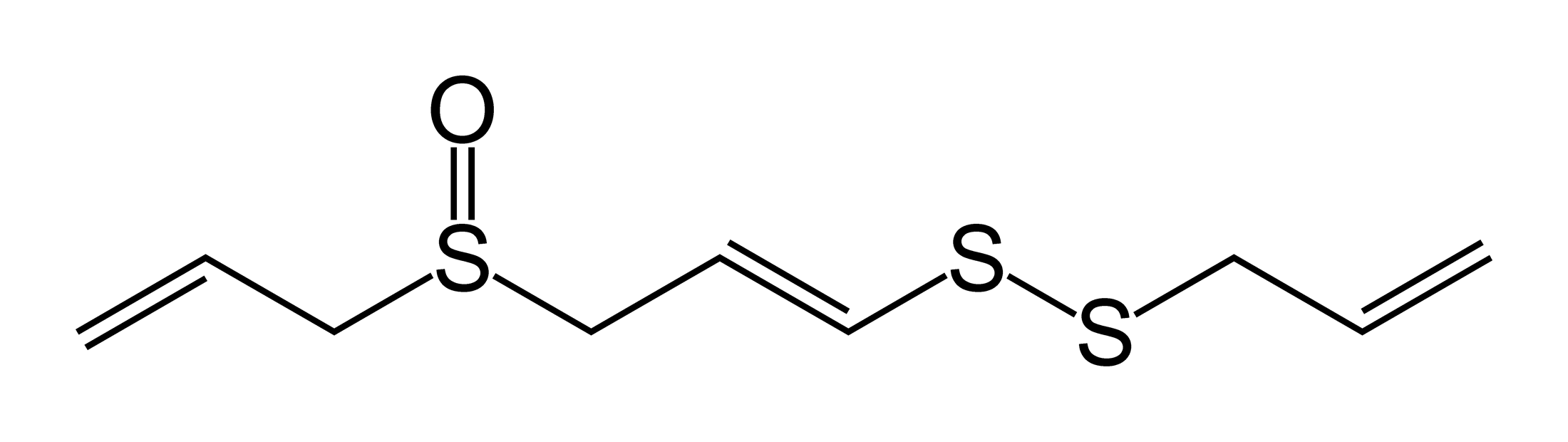 Ajoene-skeletal